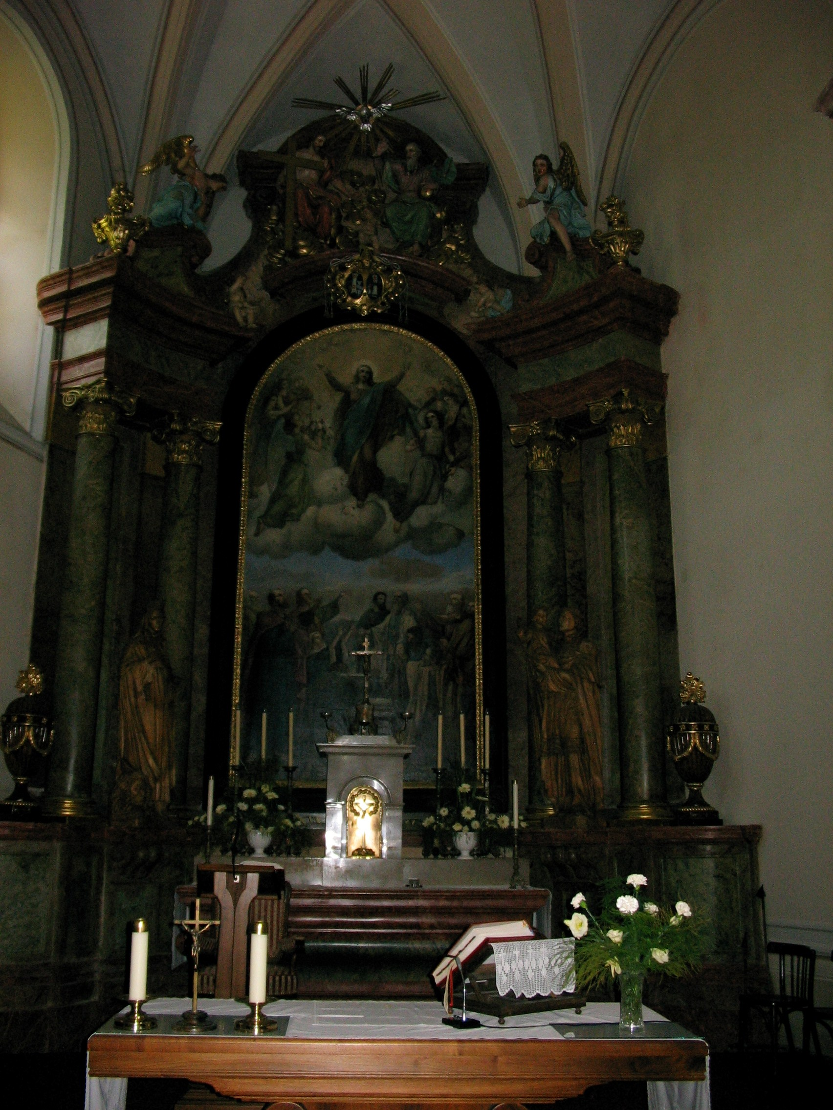 A csornai Öregtemplom főoltára